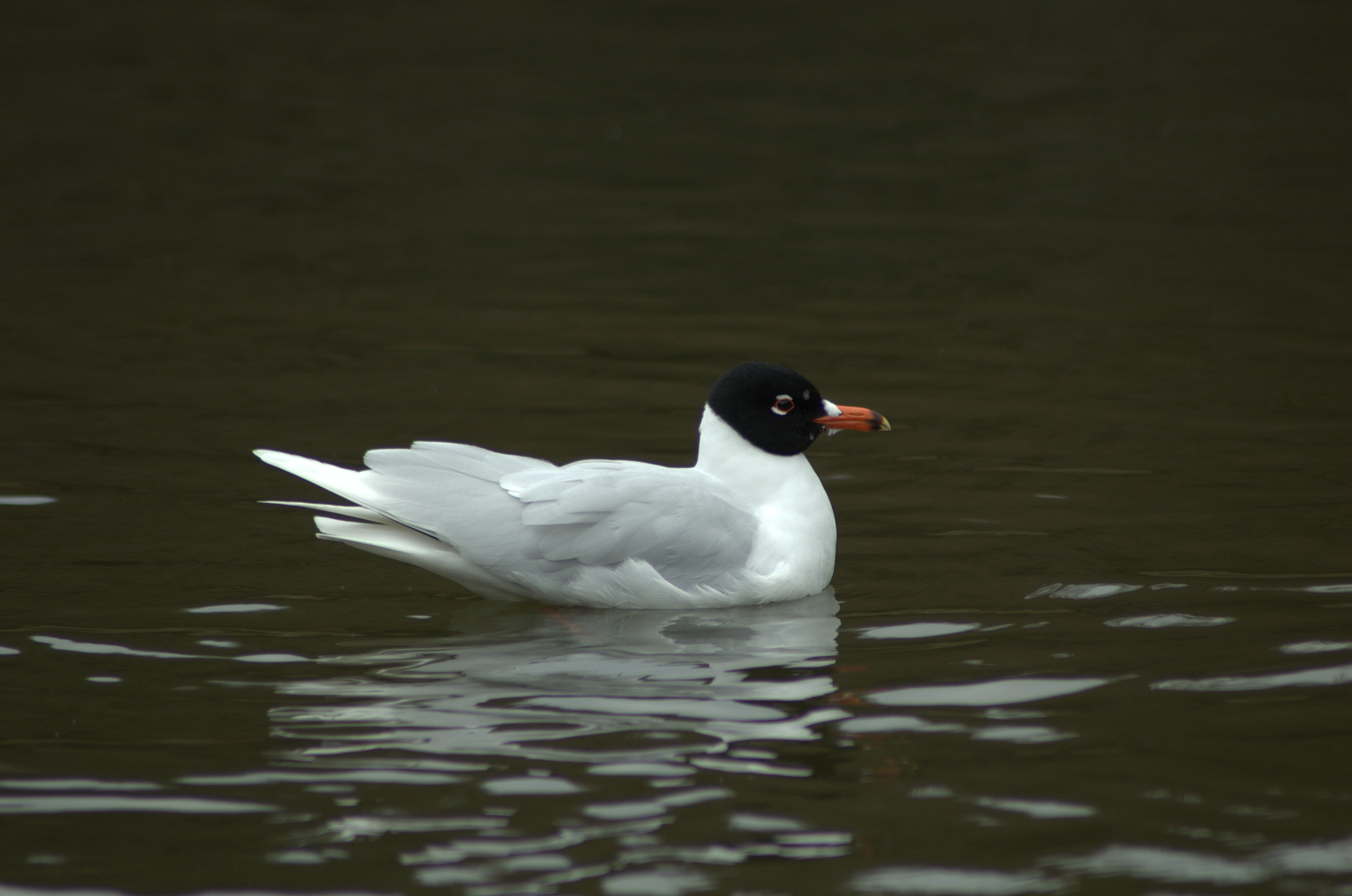 en: Bird of the species Larus melanocephalus. English name is Mediterranean Gull. The photograph was taken in the park Slottskogen in Gothenburg, Sweden. This species is very rare in this area. Normally the mediterranean gulls are seen around the Caspian Ocean. sv: En svarthuvad mås fotograferad i Slottskogen, Göteborg. Notera att stjärtfjädrarna är vita till skillnad ifrån skrattmåsen som har svarta stjärtfjädrar. Denna arten är mycket ovanlig i Göteborgsområdet. Normalt hittar man den svart-huvade måsen kring Kaspiska havet. Camera: Nikon D50 Location: Gothenburg, Sweden.